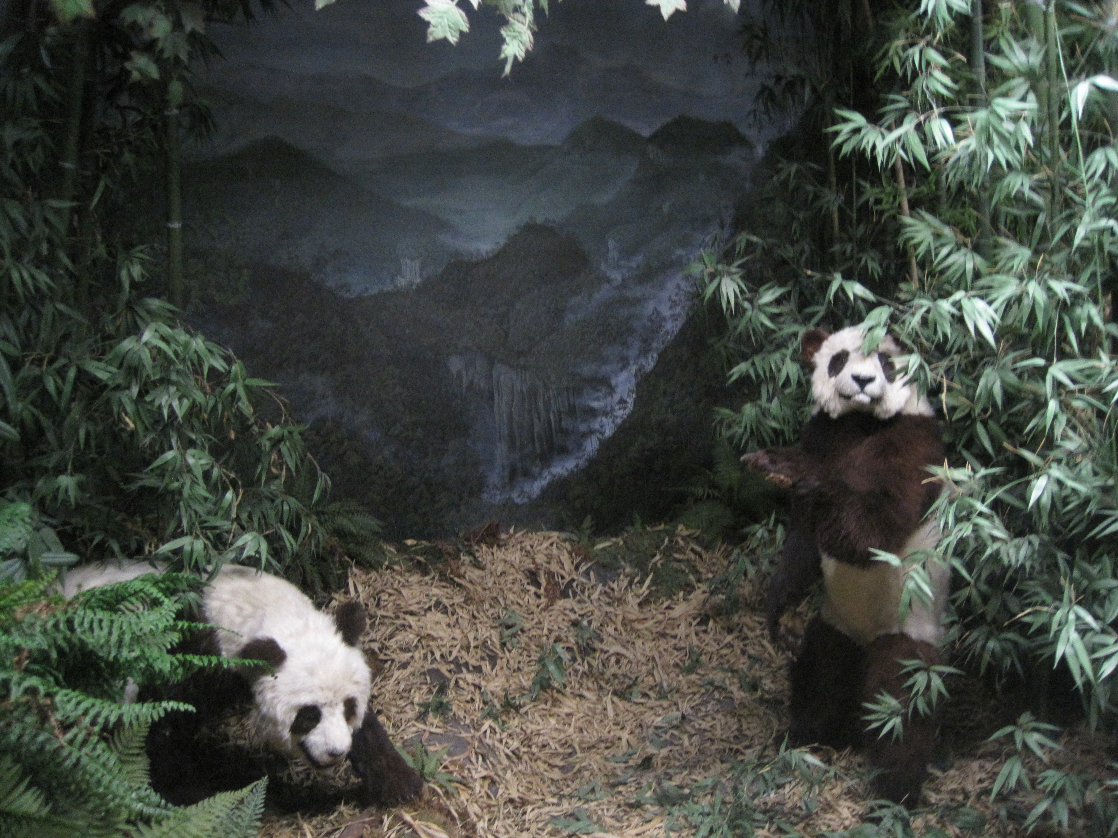 Diorama mit ausgestopften Pandas im Naturhistorischen Museum der Burgergemeinde Bern